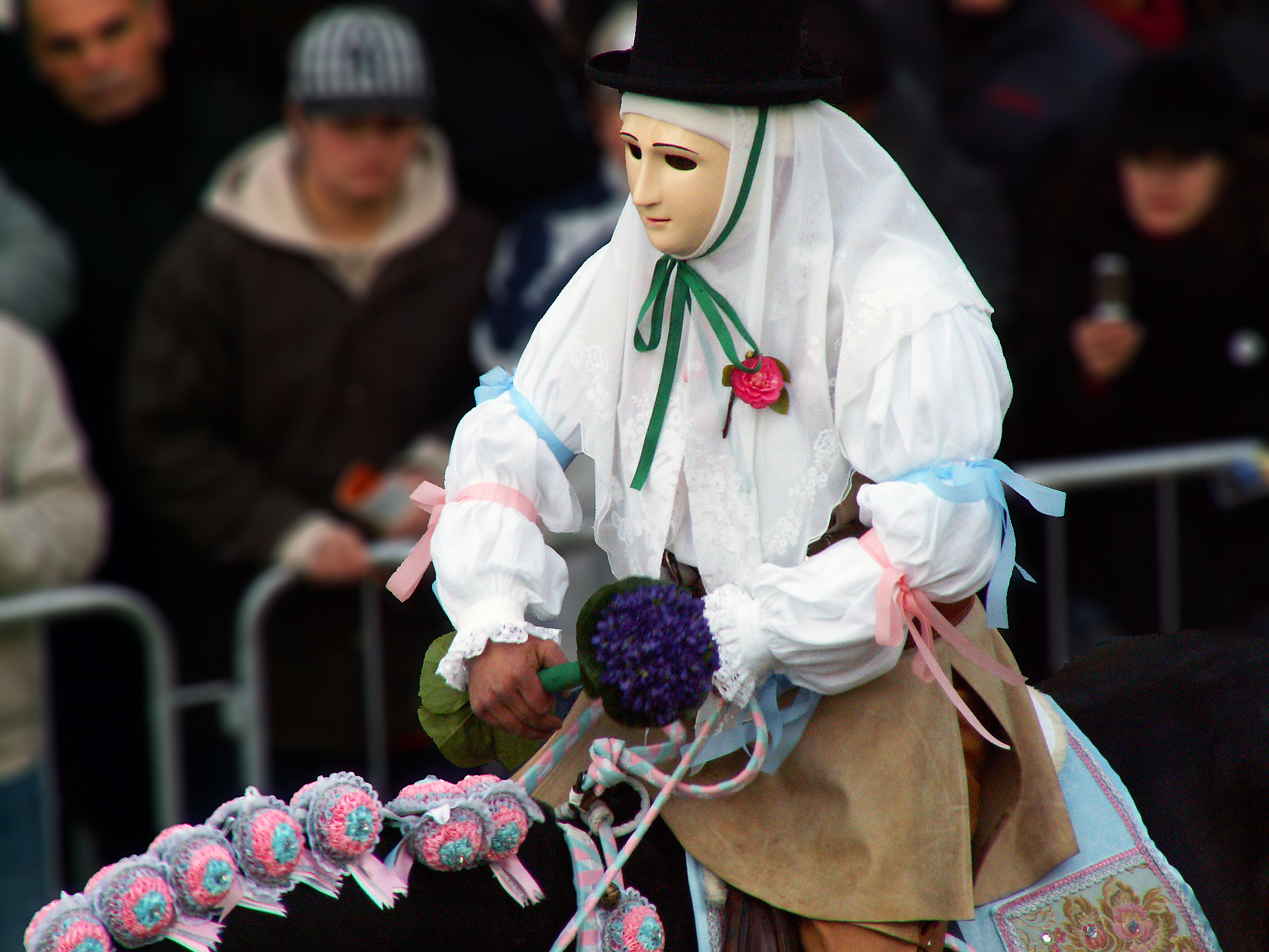 Oristano Cumponidori Gremio dei Falegnami 2006